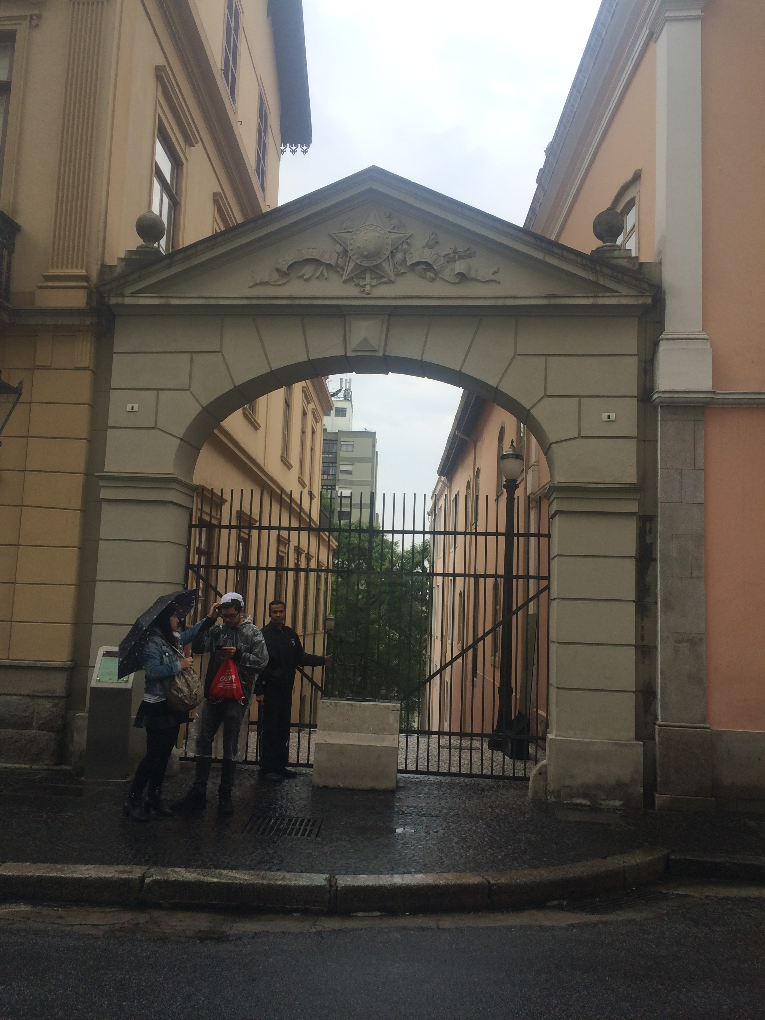 Visão frontal do portão de entrada do Beco do Pinto, no Largo Páteo do Colégio, no centro de São Paulo